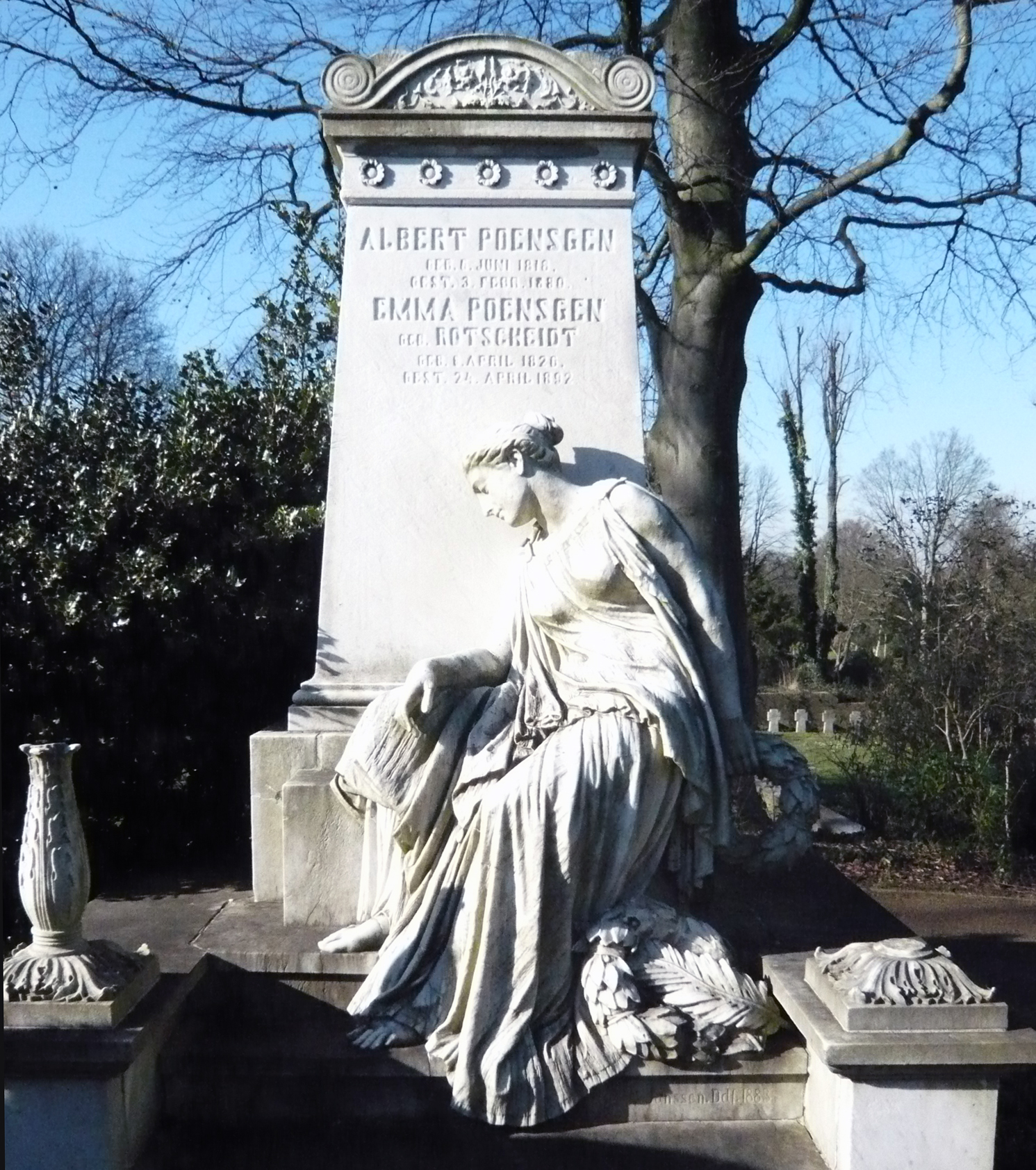 Poensgen, Grabmal Nordfriedhof Düsseldorf, von Karl Janssen, Februar 2016